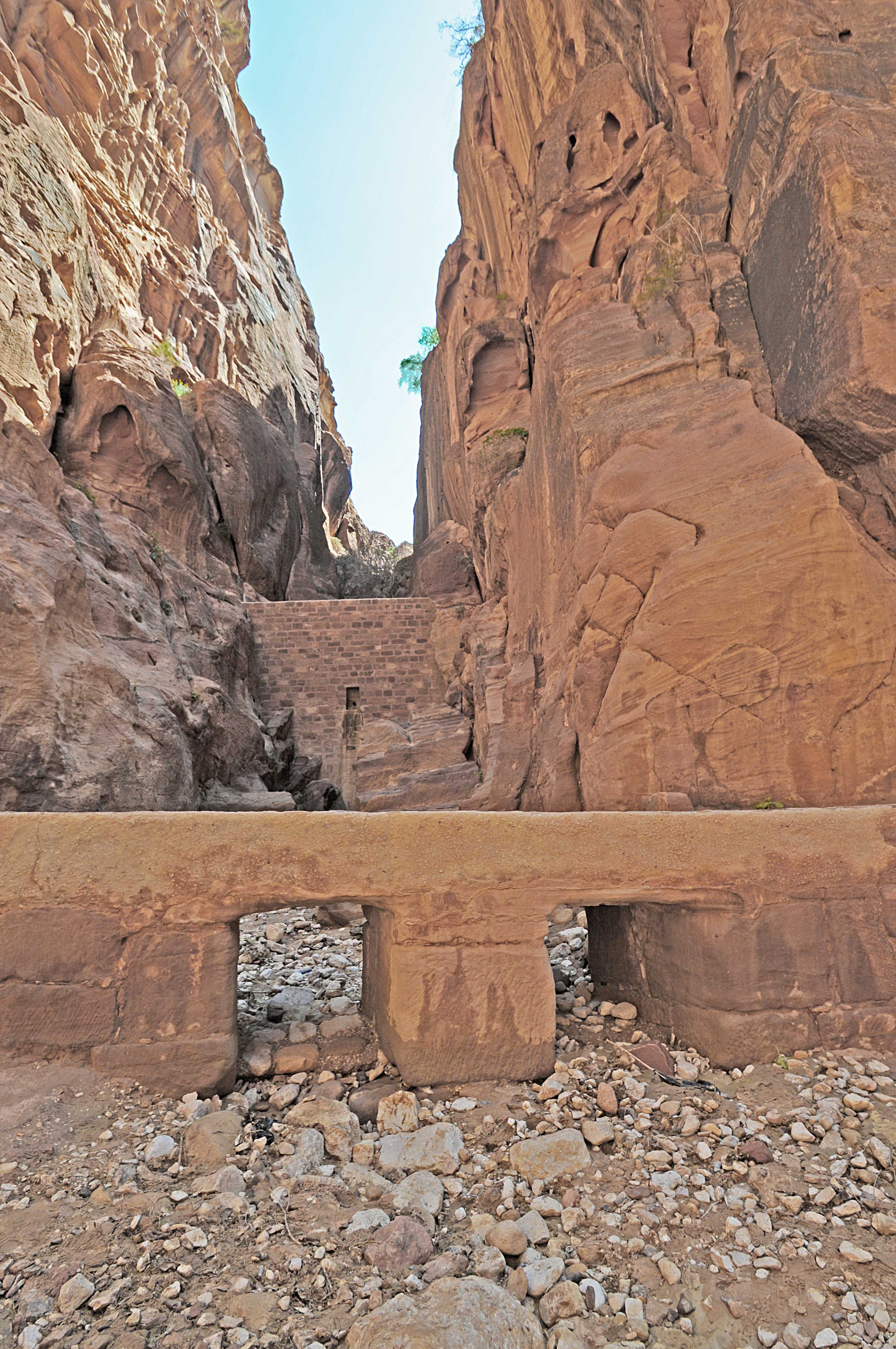 Un barrage en bas du wadi, avec deuxième barrage régulateur un peu plus bas.